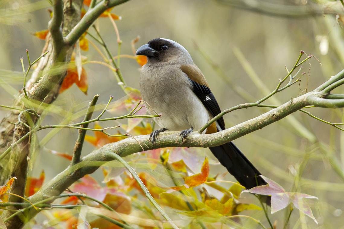 Grey Treepie - Taiwan_S4E5639